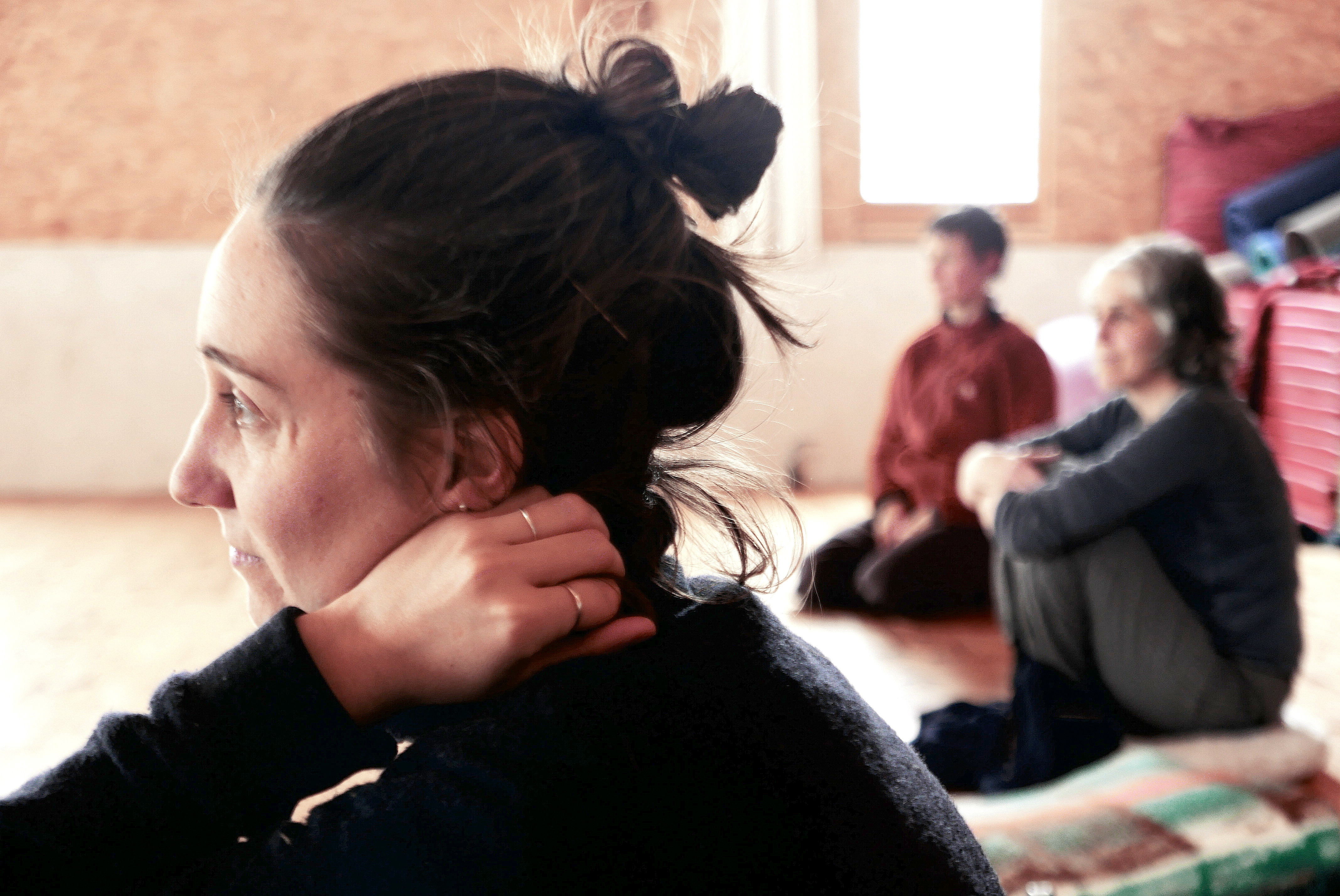 Les témoins cultivent une présence bienveillante inconditionnelle, tout en restant à l'écoute de leur propre expérience.